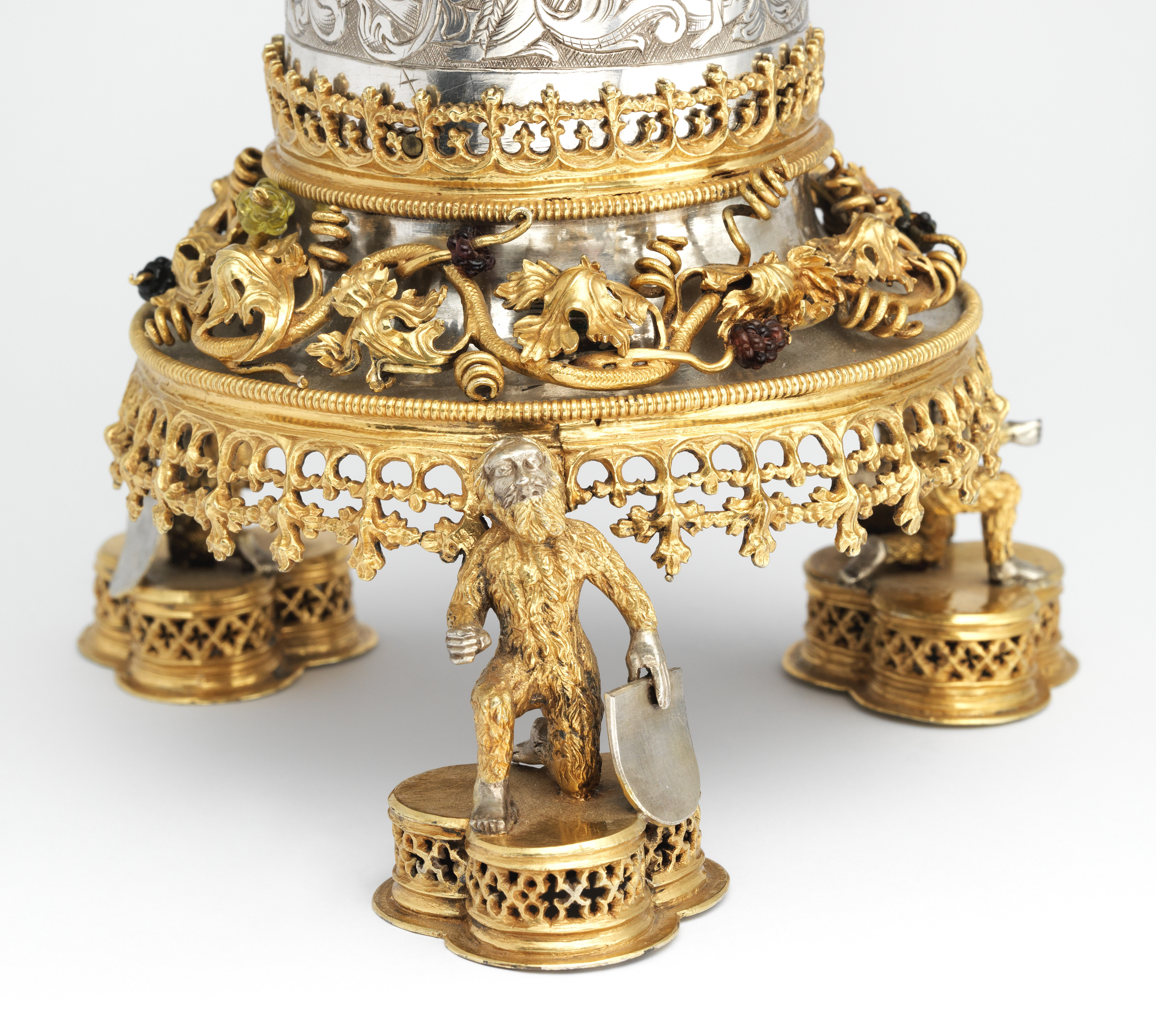 Hommes sauvages agenouillés tenant des écus